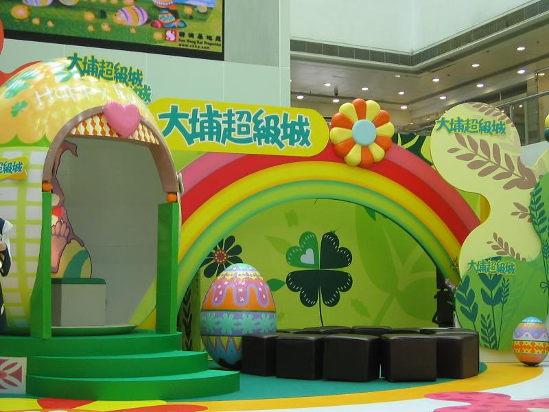 Tai Po Mega Mall 2005